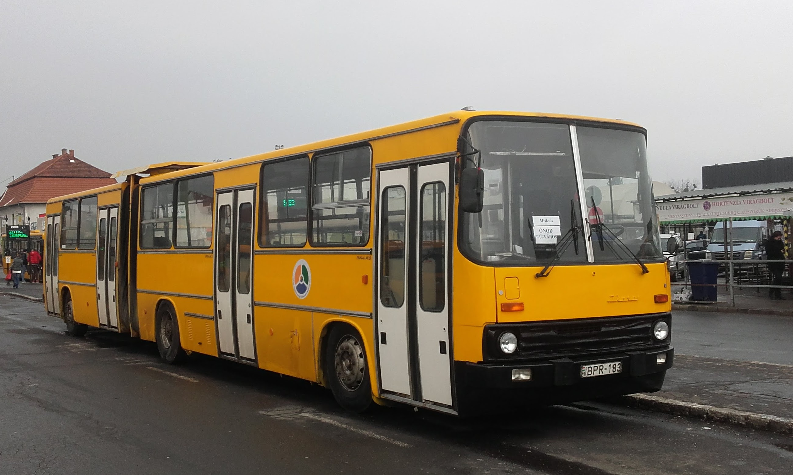 Az ÉMKK BPR-183 rendszámú Ikarus 280 típusú busza Miskolcon, a 3744-es helyközi járaton.